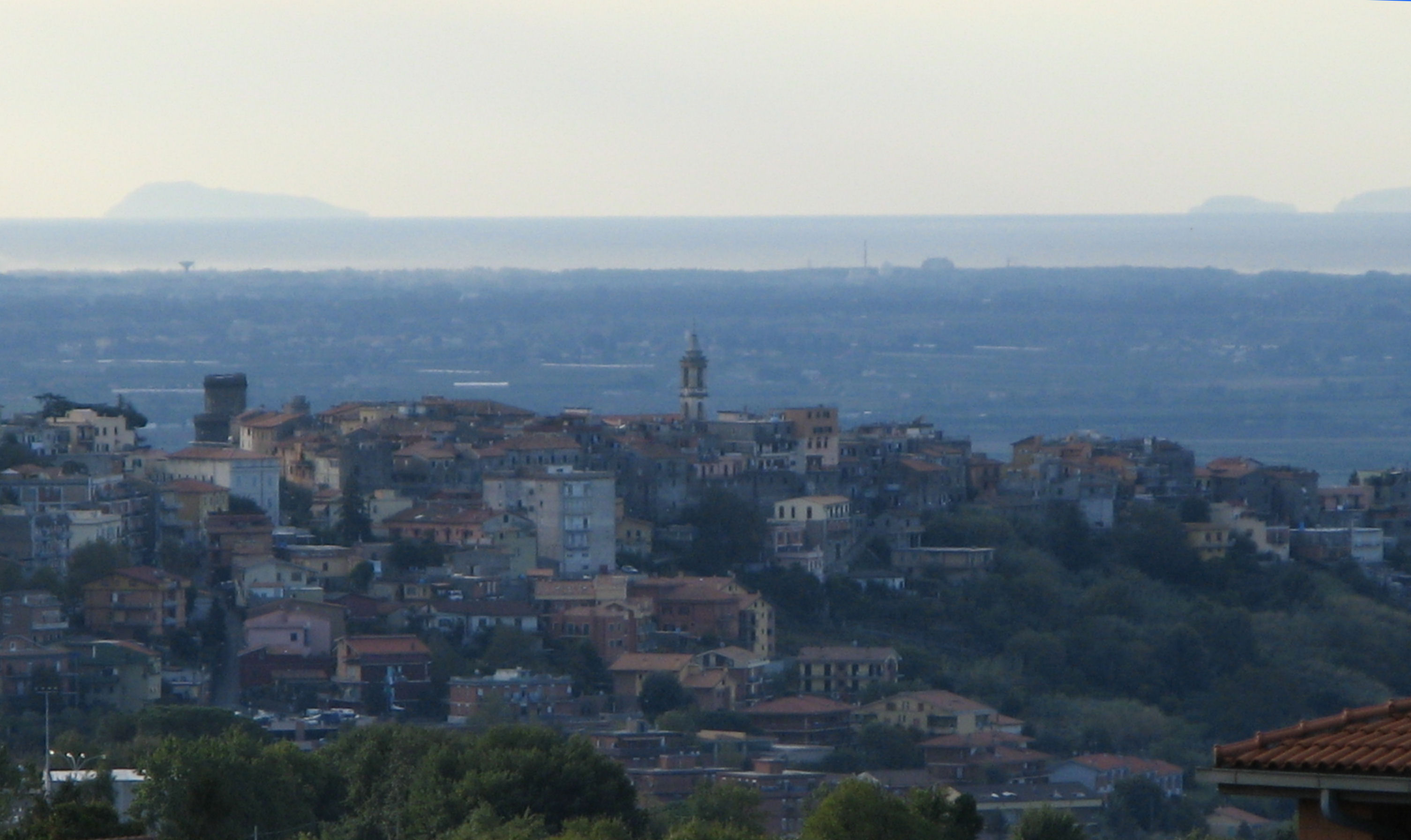 Lanuvio (Lazio, Italia): Panorama. Sullo sfondo: Mar Mediterraneo e isole Pontine.